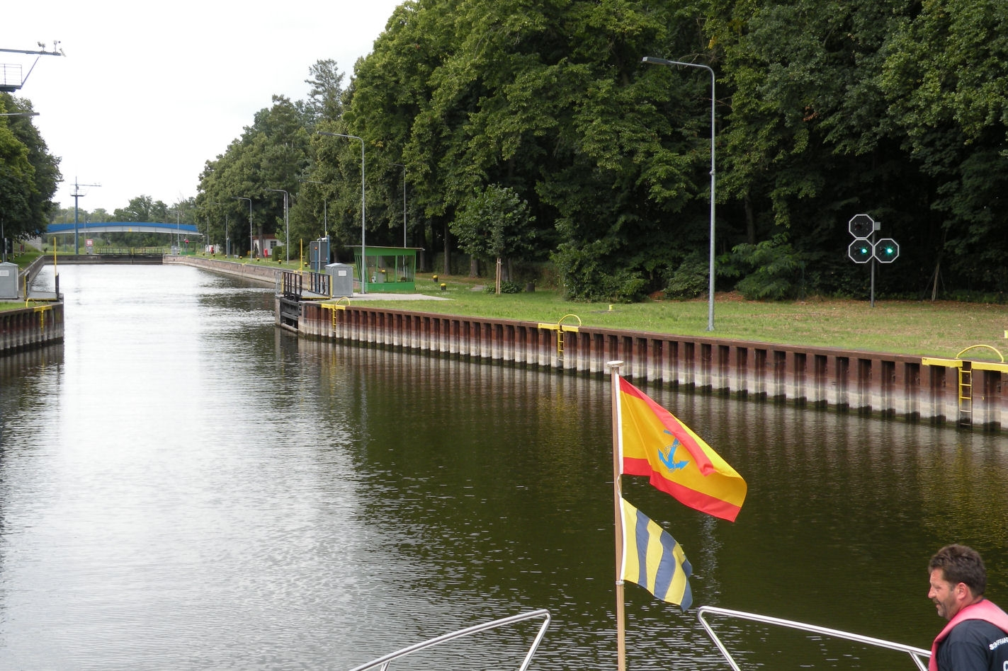 Die Schleuse Bahnitz, Untere Havel-Wasserstraße Kilometer 81,95